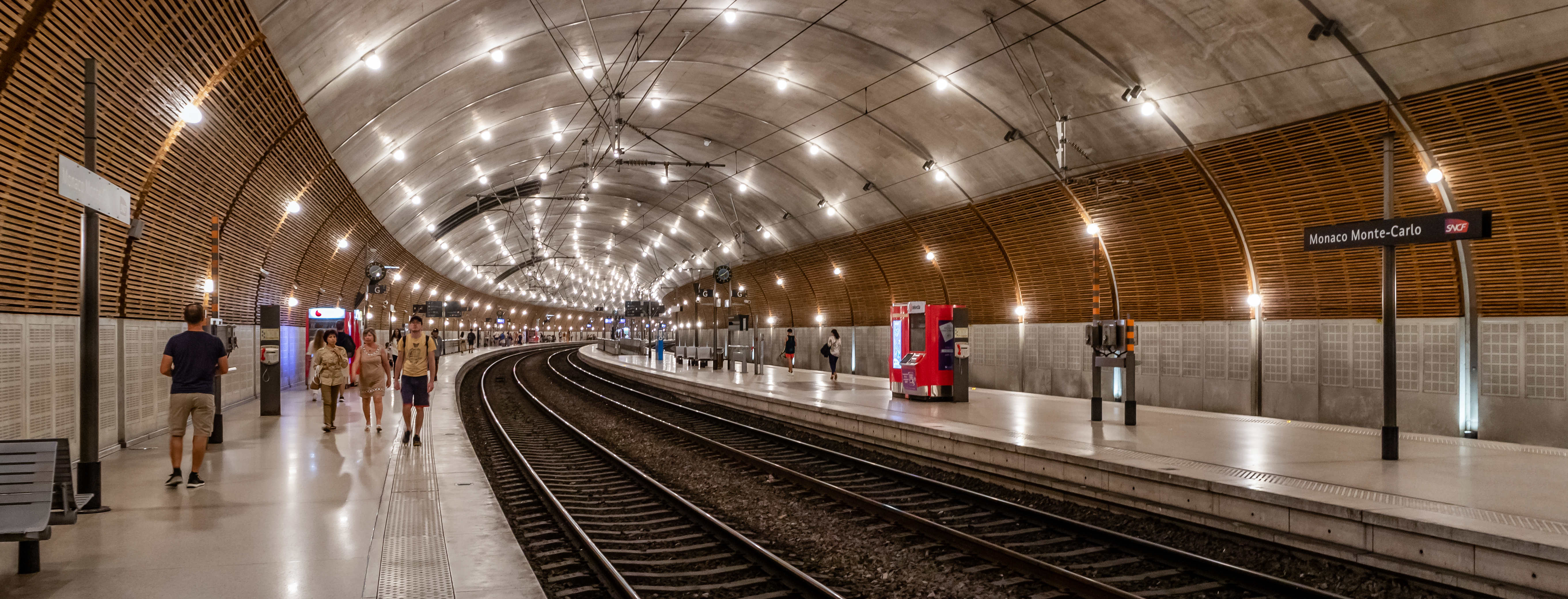 Monaco Monte-Carlo Train Station